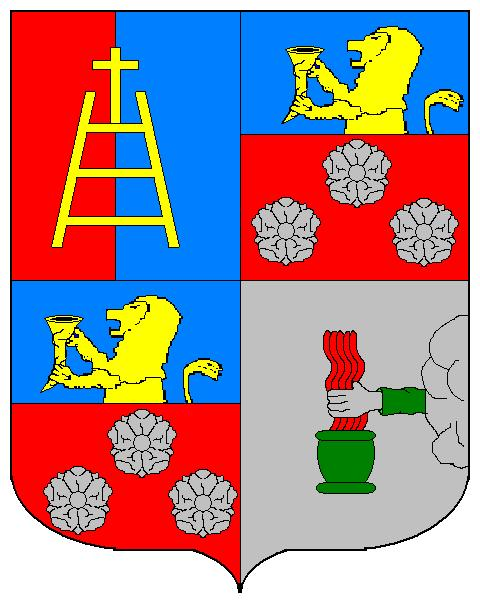 Grb obitelji Benedetti